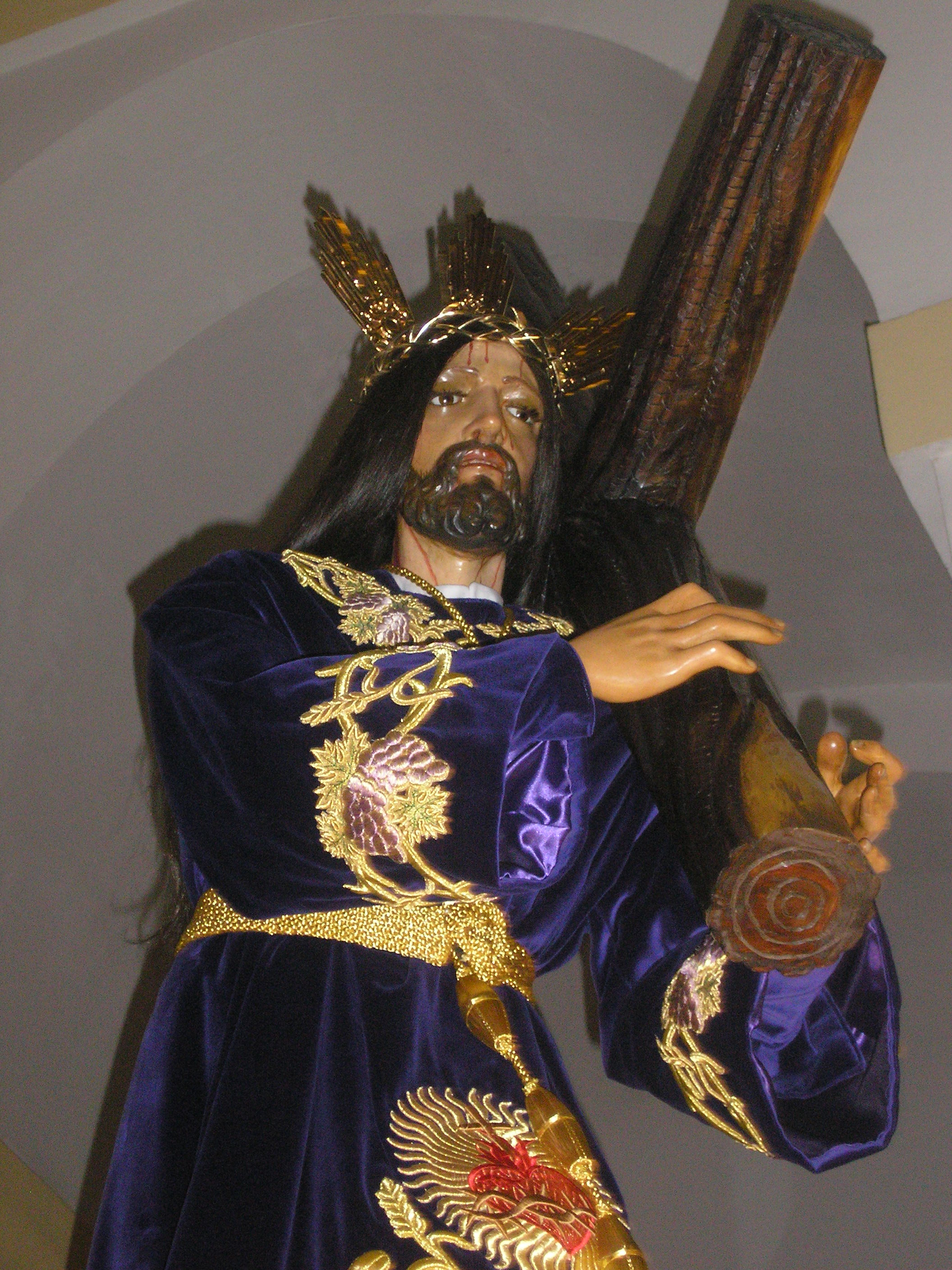 Jesús Nazareno con la Cruz a cuestas de Santa Olalla (Toledo)